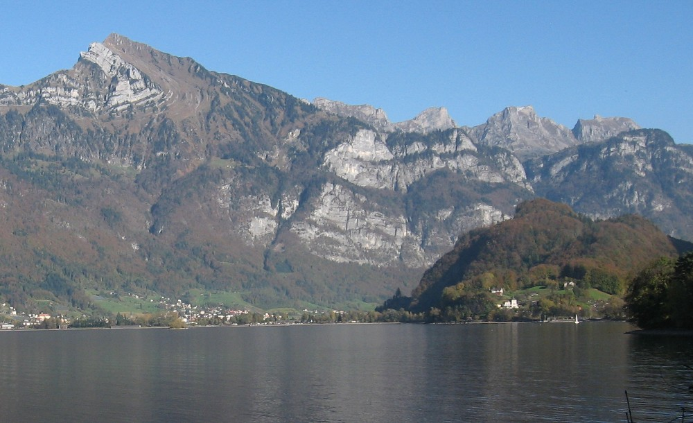 Über dem Ostende des Walensees thront der Sichelchamm, in dessen Fortsetzung sich der Gamsberg via Alvier bis zum Gauschla (ganz rechts) zieht.